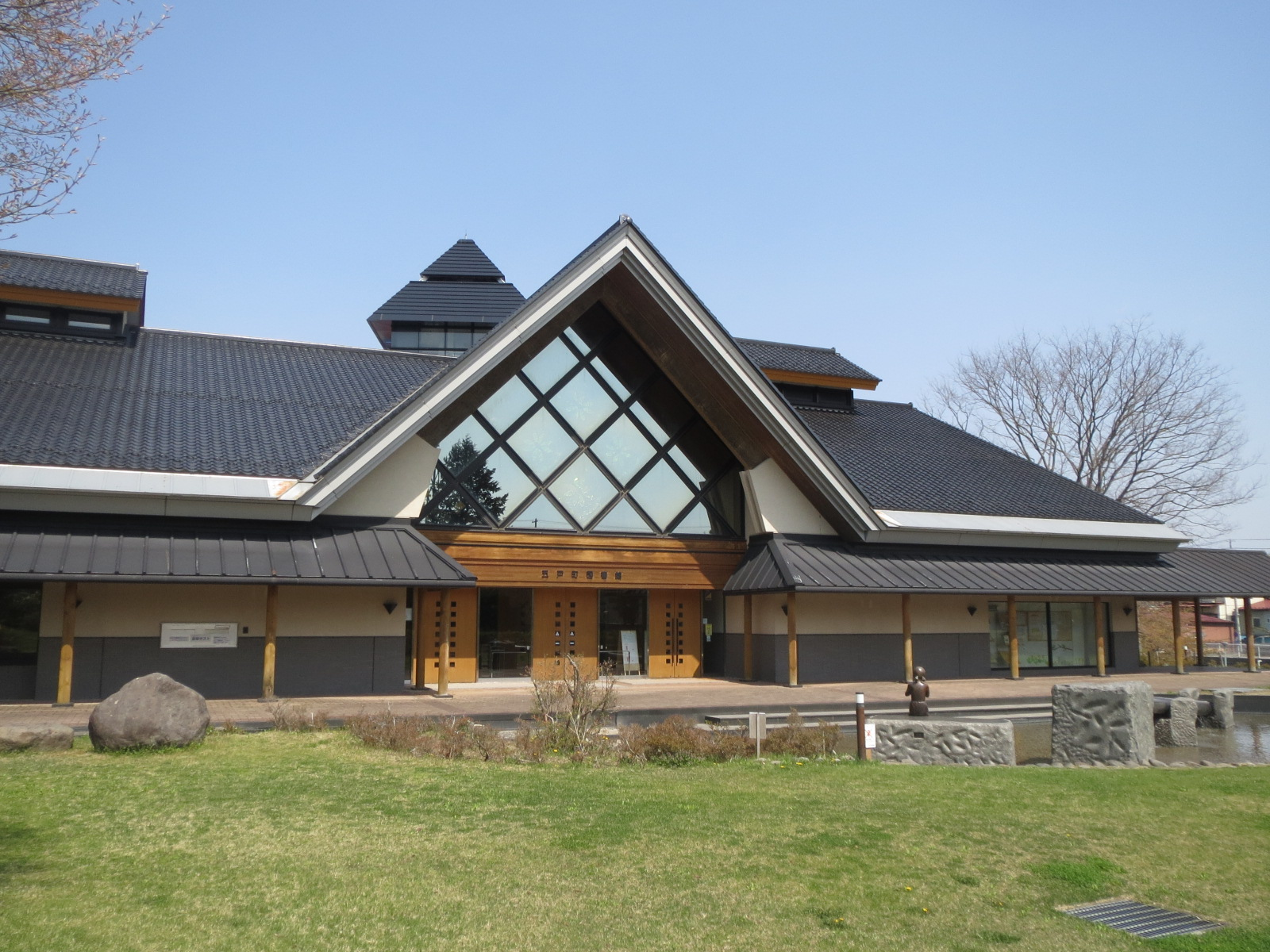 五戸町図書館 Canon IXY 3